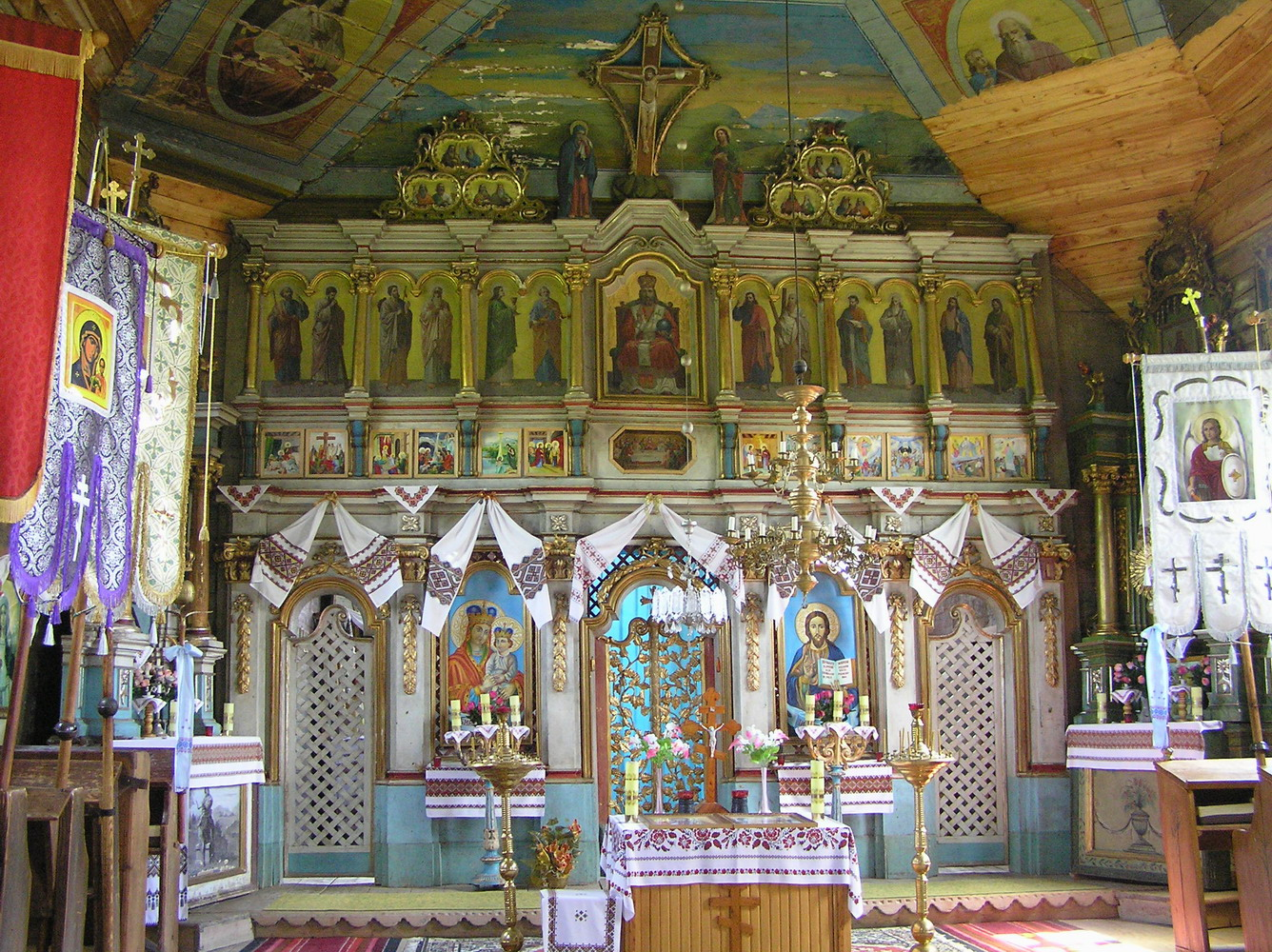 Ikonostas cerkwi w Turzańsku. Zabytek wpisany pod nr A-78 z 31.01.1985 do rejestru zabytków województwa podkarpackiego